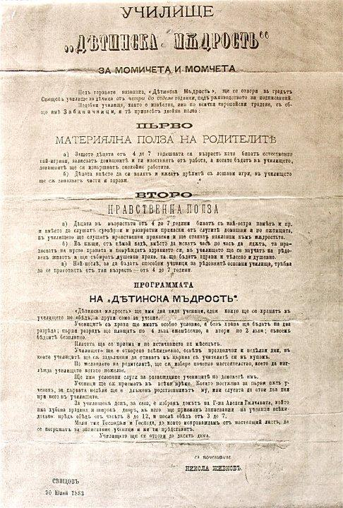 Обява за "Детинска мъдрост"